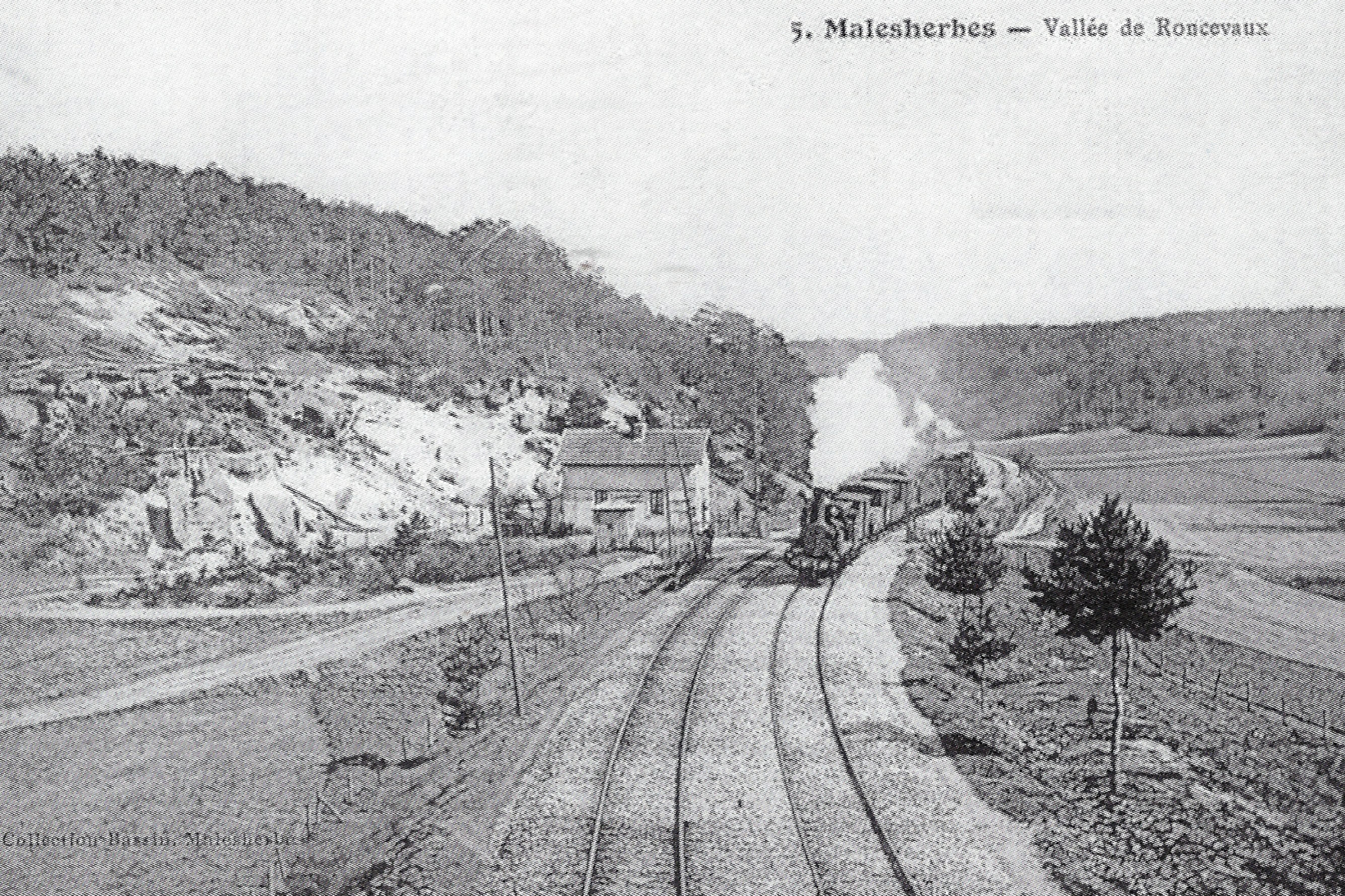 Ligne de Bourron-Marlotte à Malesherbes - Vallée de Ronceveaux (Buthiers, Seine-et-Marne, France), au début du XX° siècle.